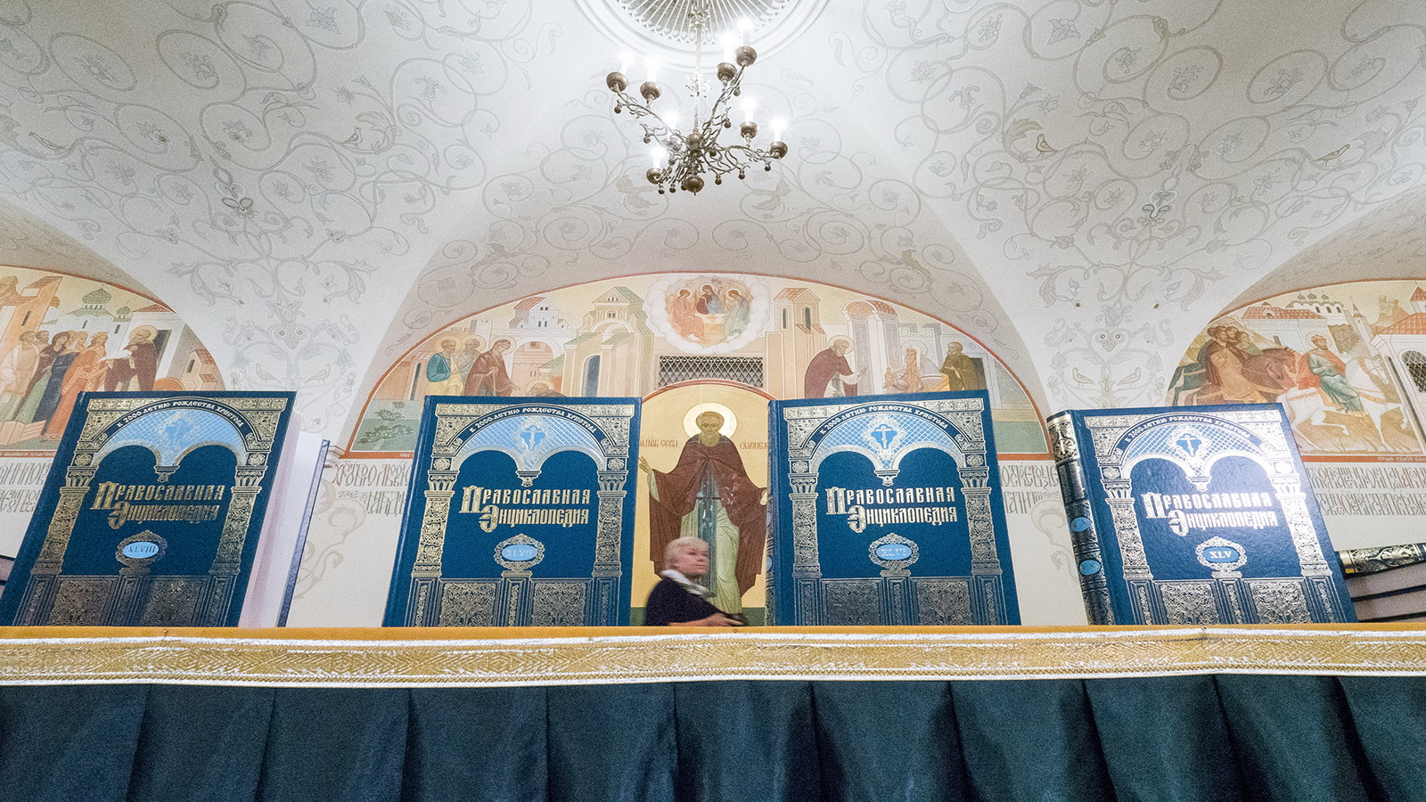 Презентация 45-48 томов Православной Энциклопедии